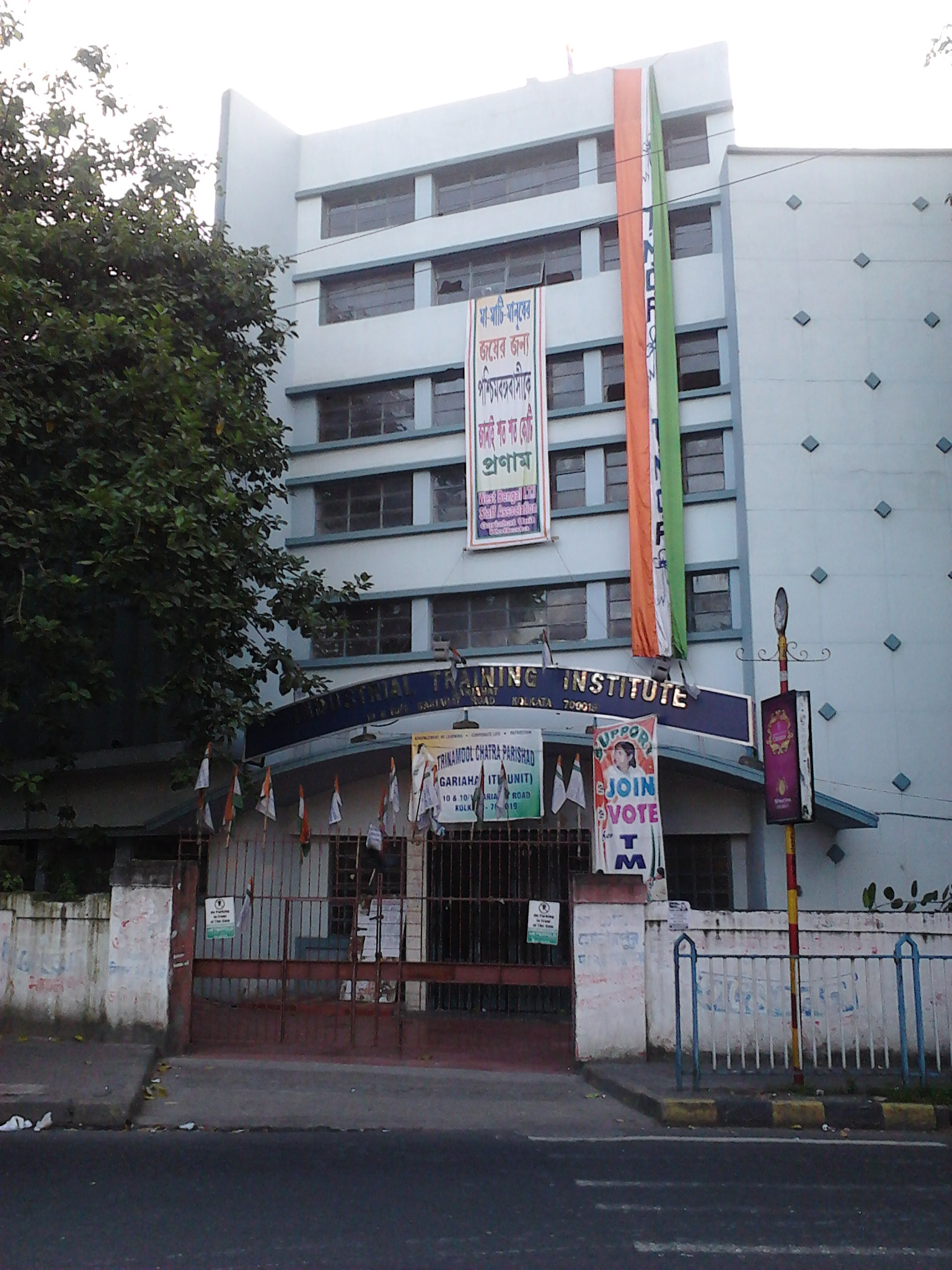 Industrial Training Institute (ITI) at Gariahat, Kolkata.